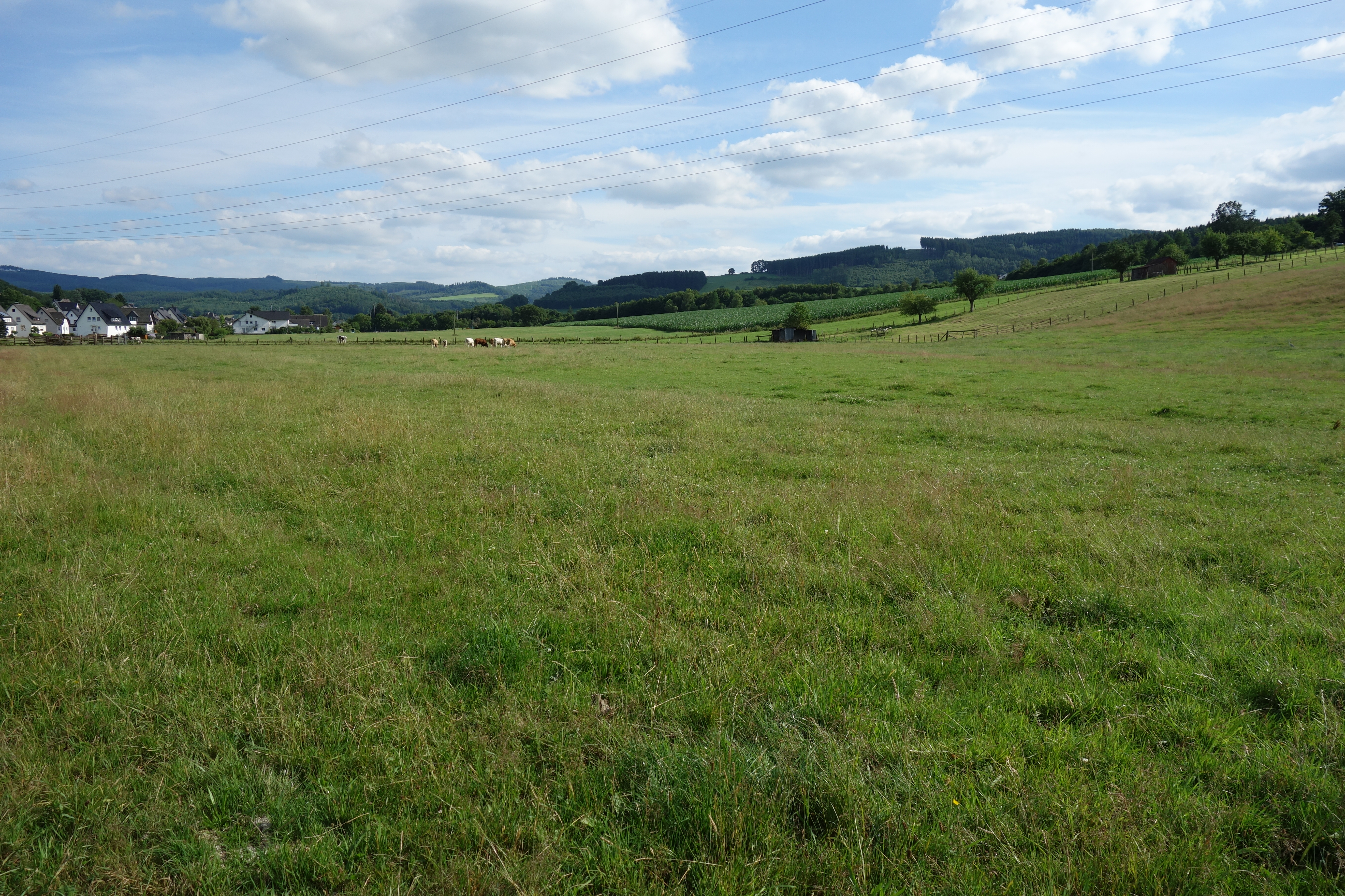 Landschaftsschutzgebiet Westliche Ortsrandlage von Olpe mit Olpe im Hintergrund.